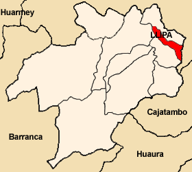 Distrito de Llipa